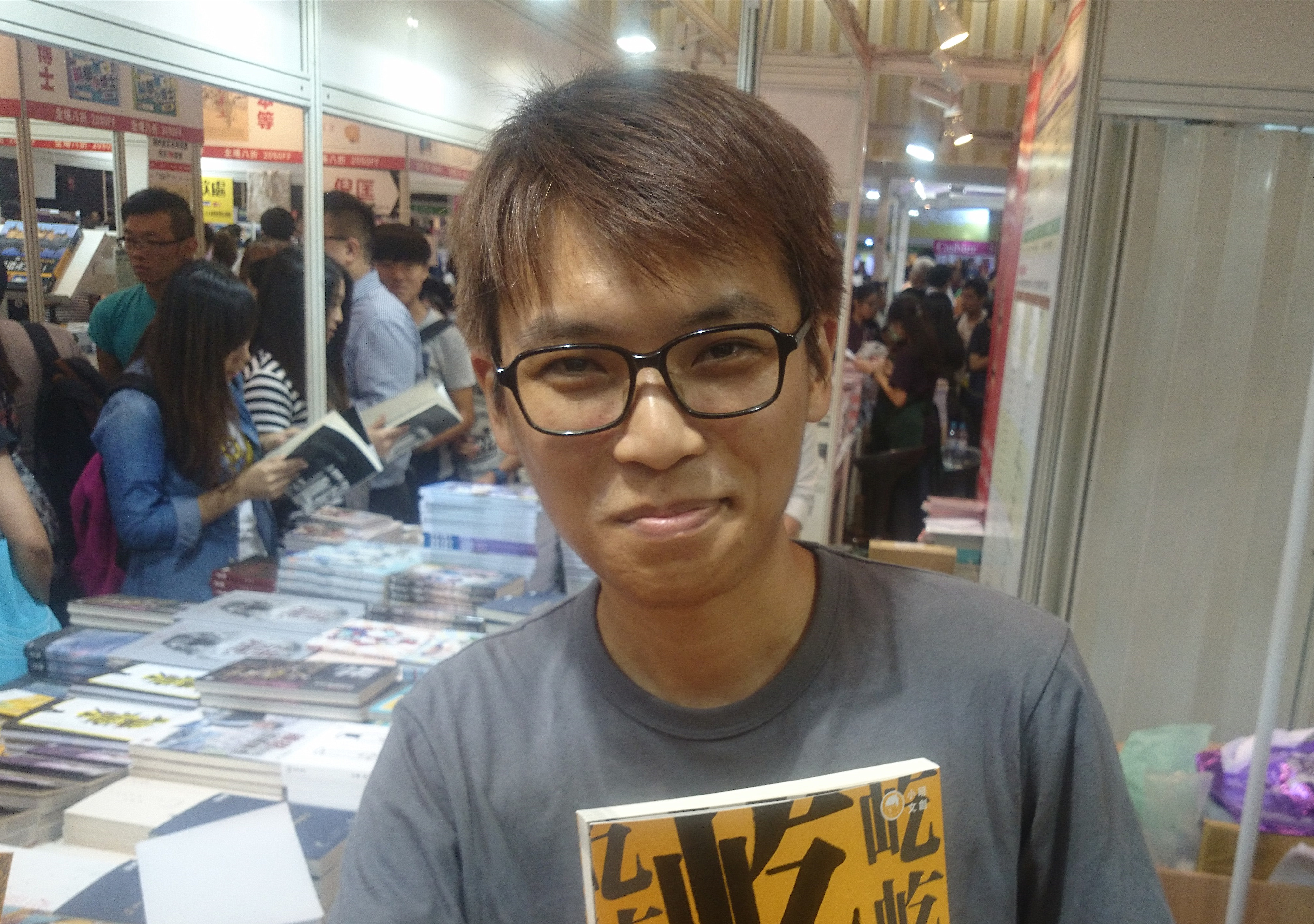 粵語: 仇思達喺2017年7月24號夜晚喺明報出版社個書展攤位度。